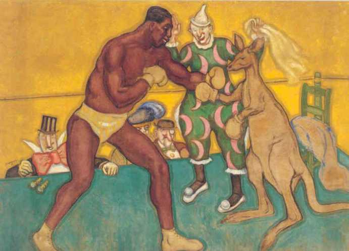 David-Ossipovitch Widhopff, "Boxeur luttant avec un kangourou", 1924, peinture sur toile, 208 x 297,5 cm (Inv. P 486) Musée municipal de l'Evéché, Limoges